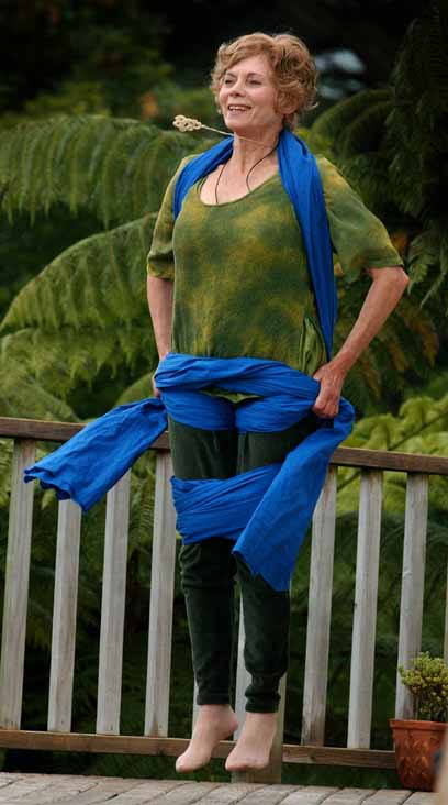 Ruthy Alon che salta nell'imbragatura di Bones For Life